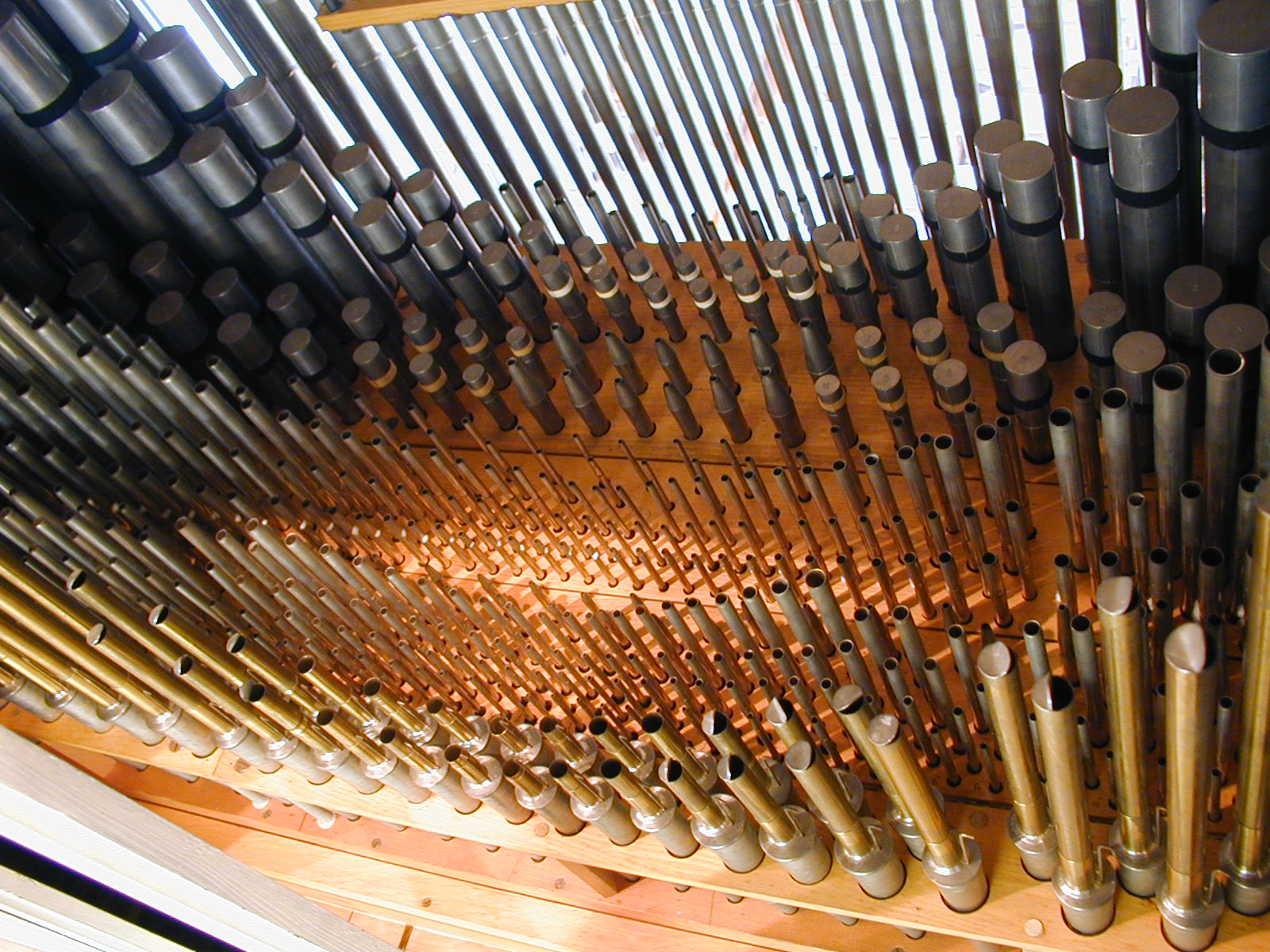 Rückpositiv der Orgel in der Evang. Stadtkirche Bad Reichenhall